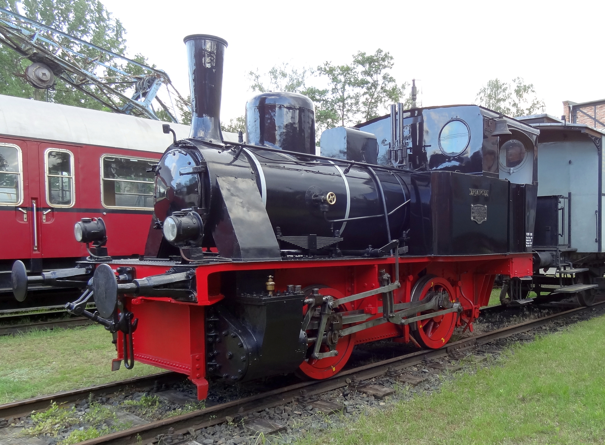 Die abgebildete Hanomag-Lokomotive mit der Werks-No.6358 arbeitet auf dem Gelände des Vereins Braunschweiger Verkehrsfreunde e.V. .